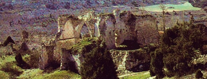 Monasterio de San Pelayo. Ruinas. Cevico Navero (Palencia).